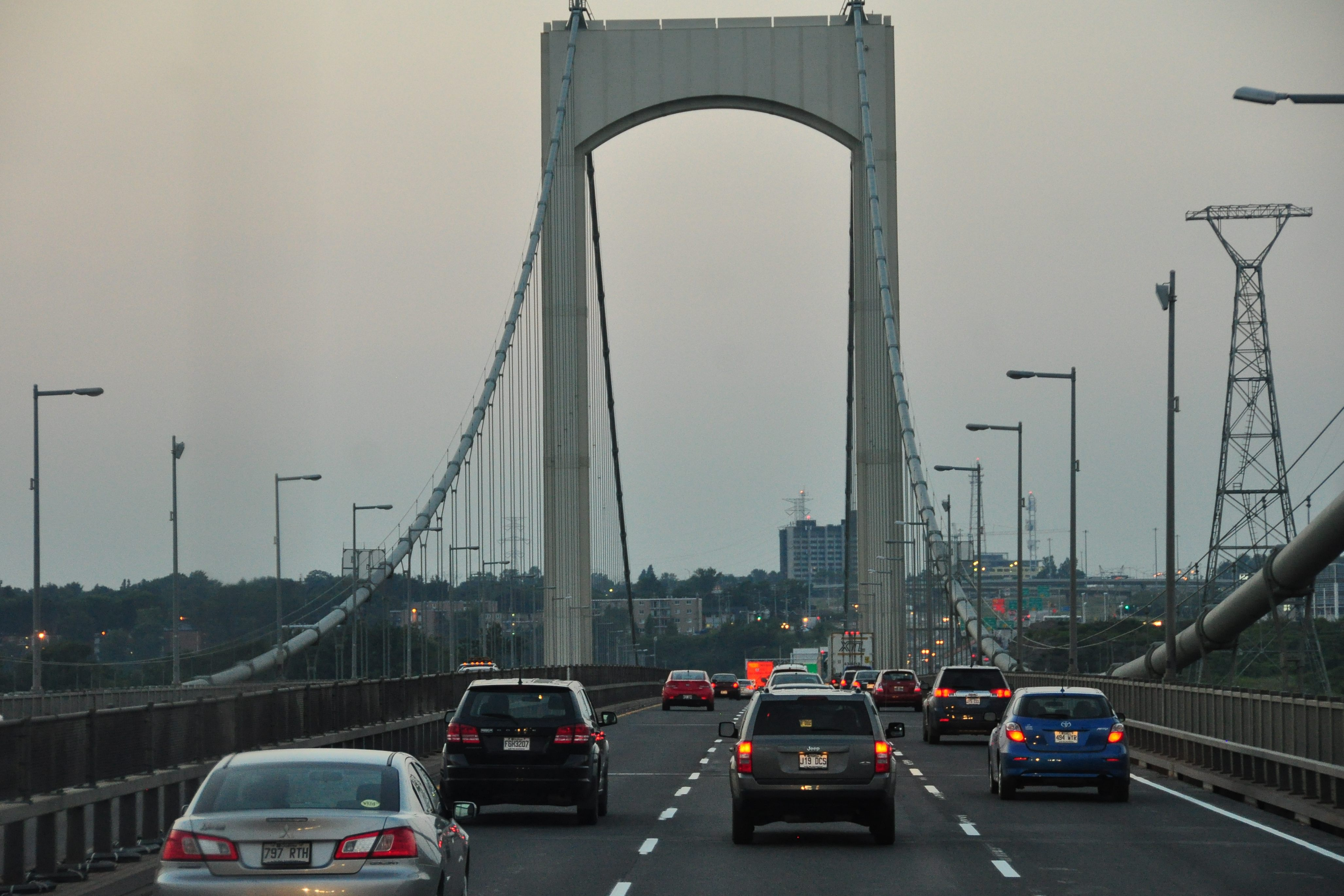 Québec